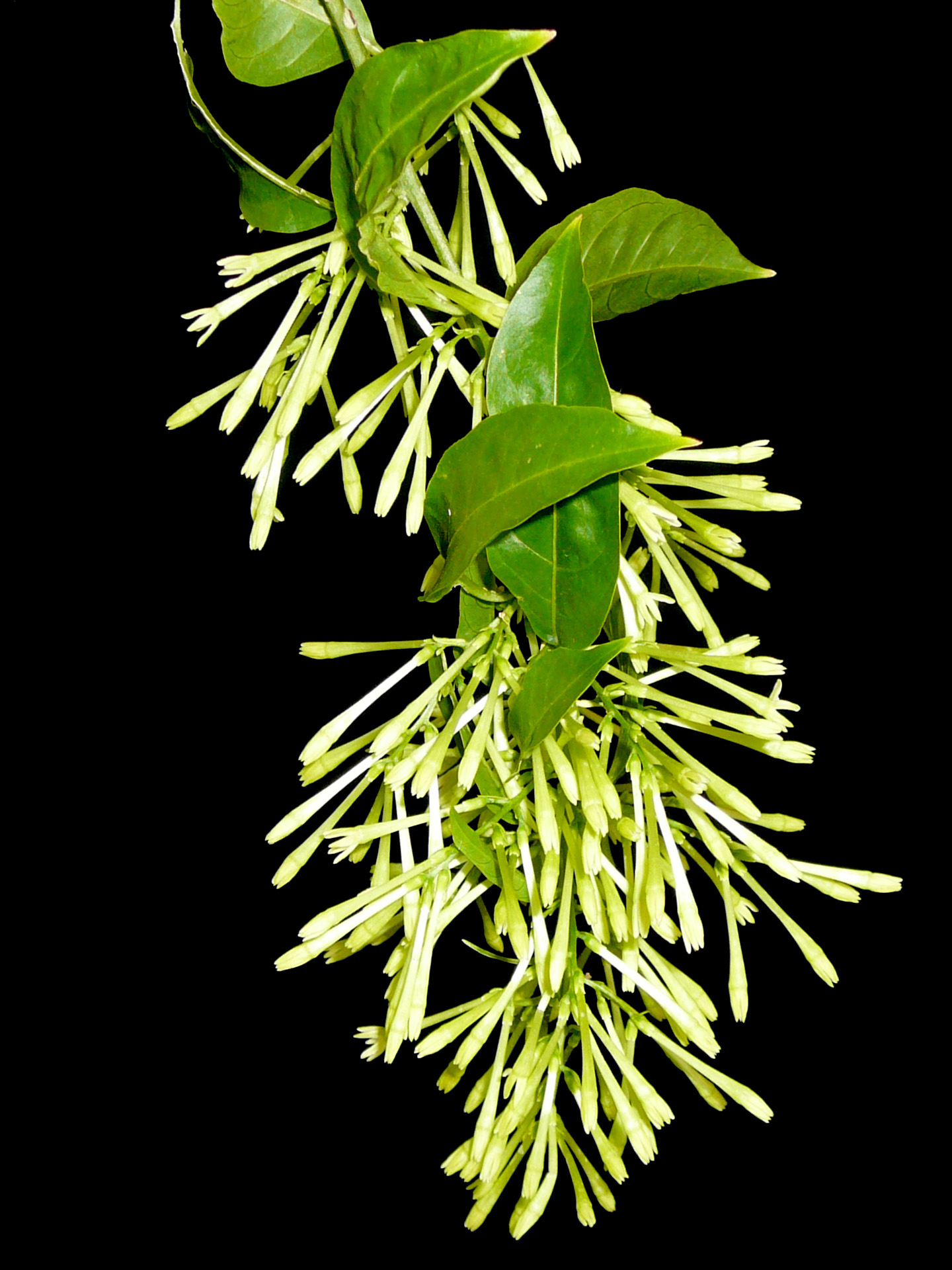 Night-blooming jasmine Cestrum nocturnum